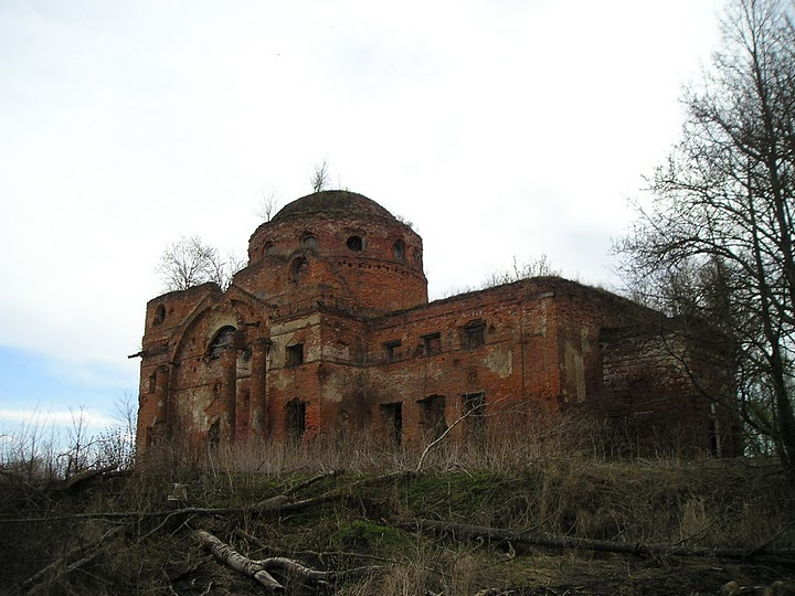 Знаменский храм в с.Маклаки